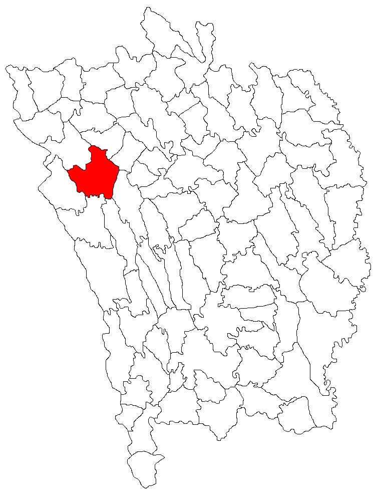 Categorie:Hărţi ale judeţului Vaslui